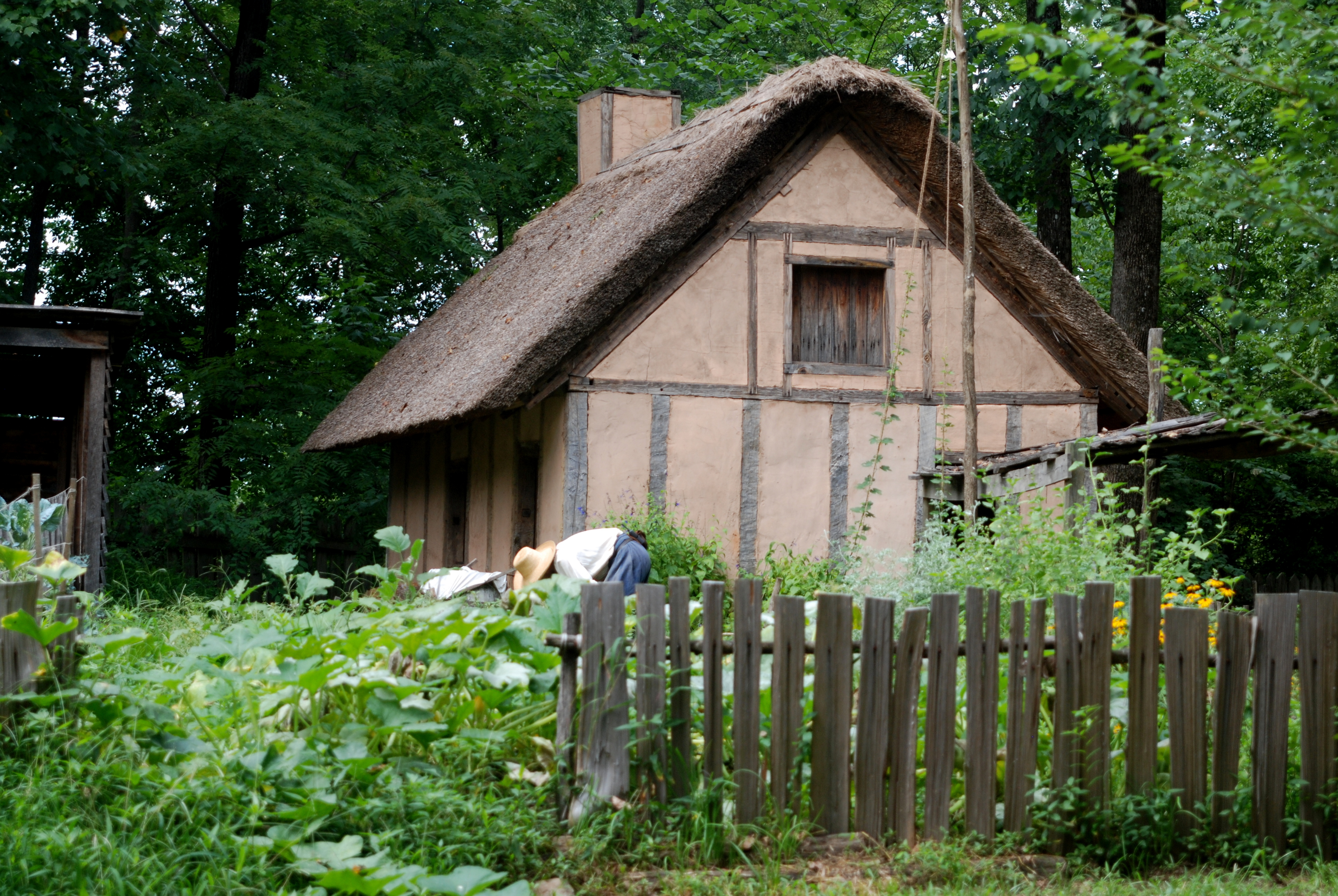 Bermuda, VA, USA